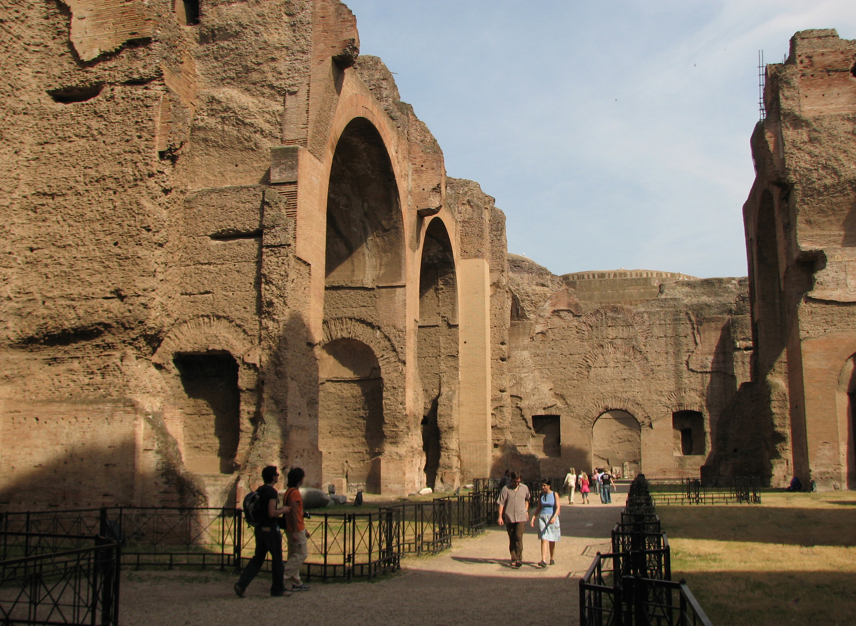 Le Terme di Caracalla a Roma, Italia